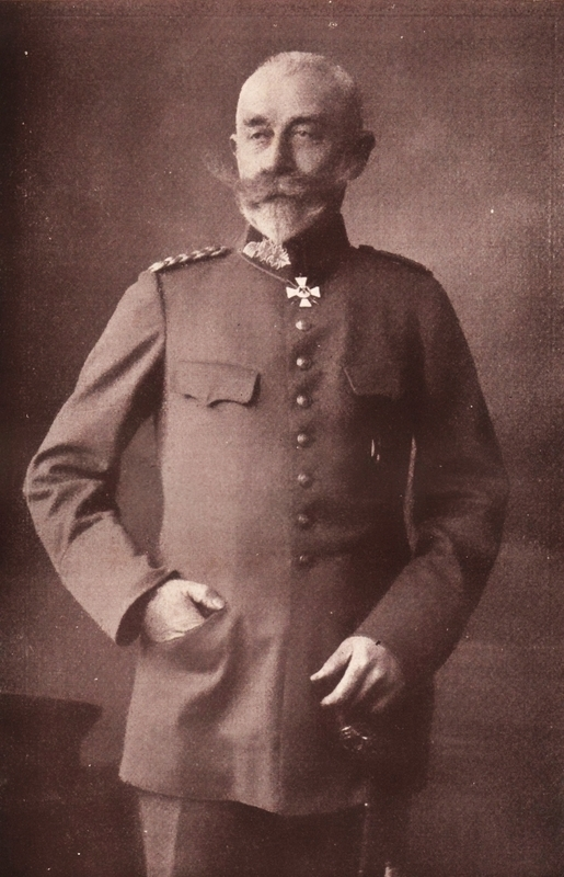 Kommandeur Ernst Schonfeld, Infanterie-Regiment von Boyen (5. Ostpreußisches) Nr. 41